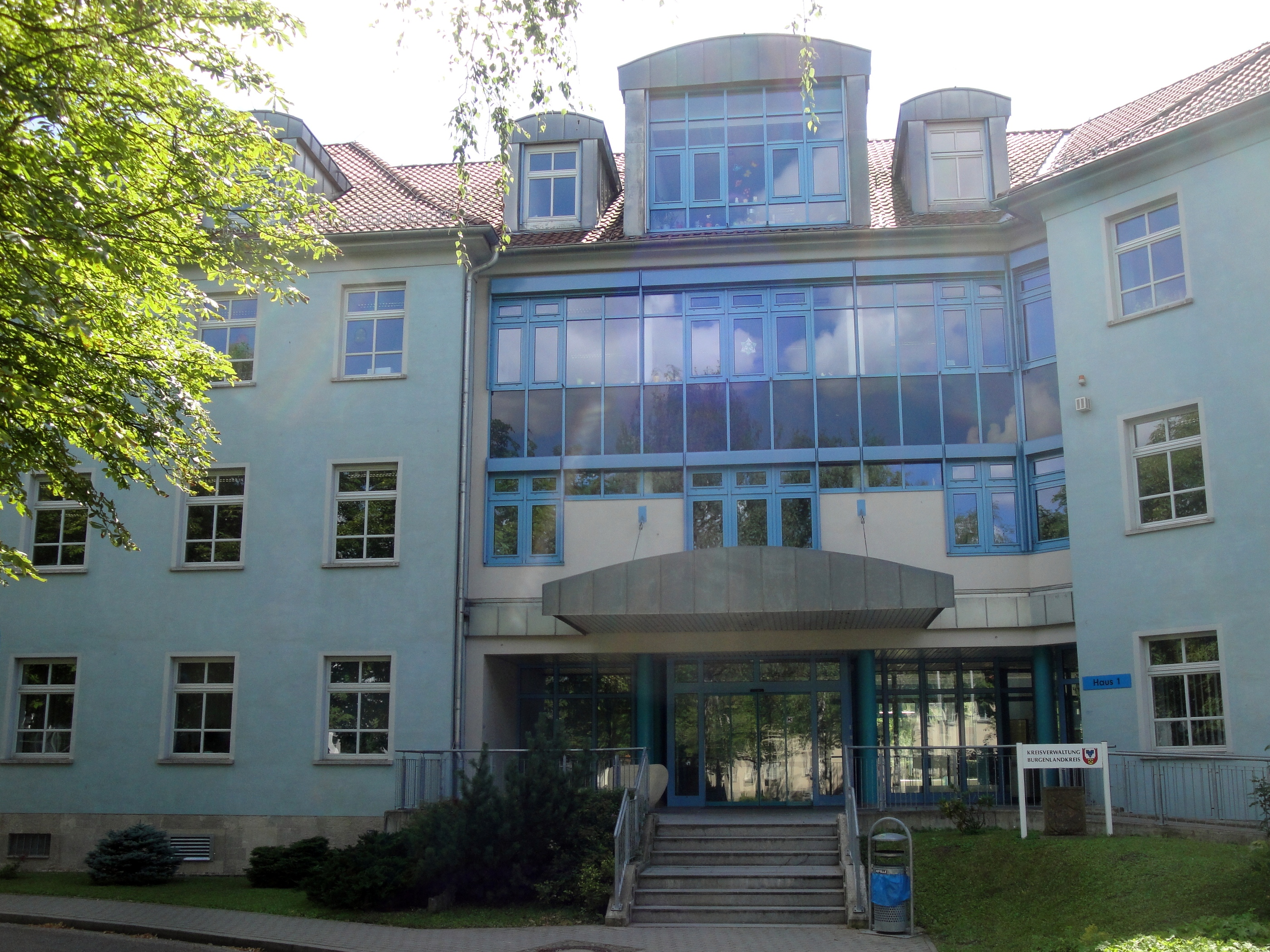 Kreisverwaltung Burgenlandkreis, Naumburg (Saale)